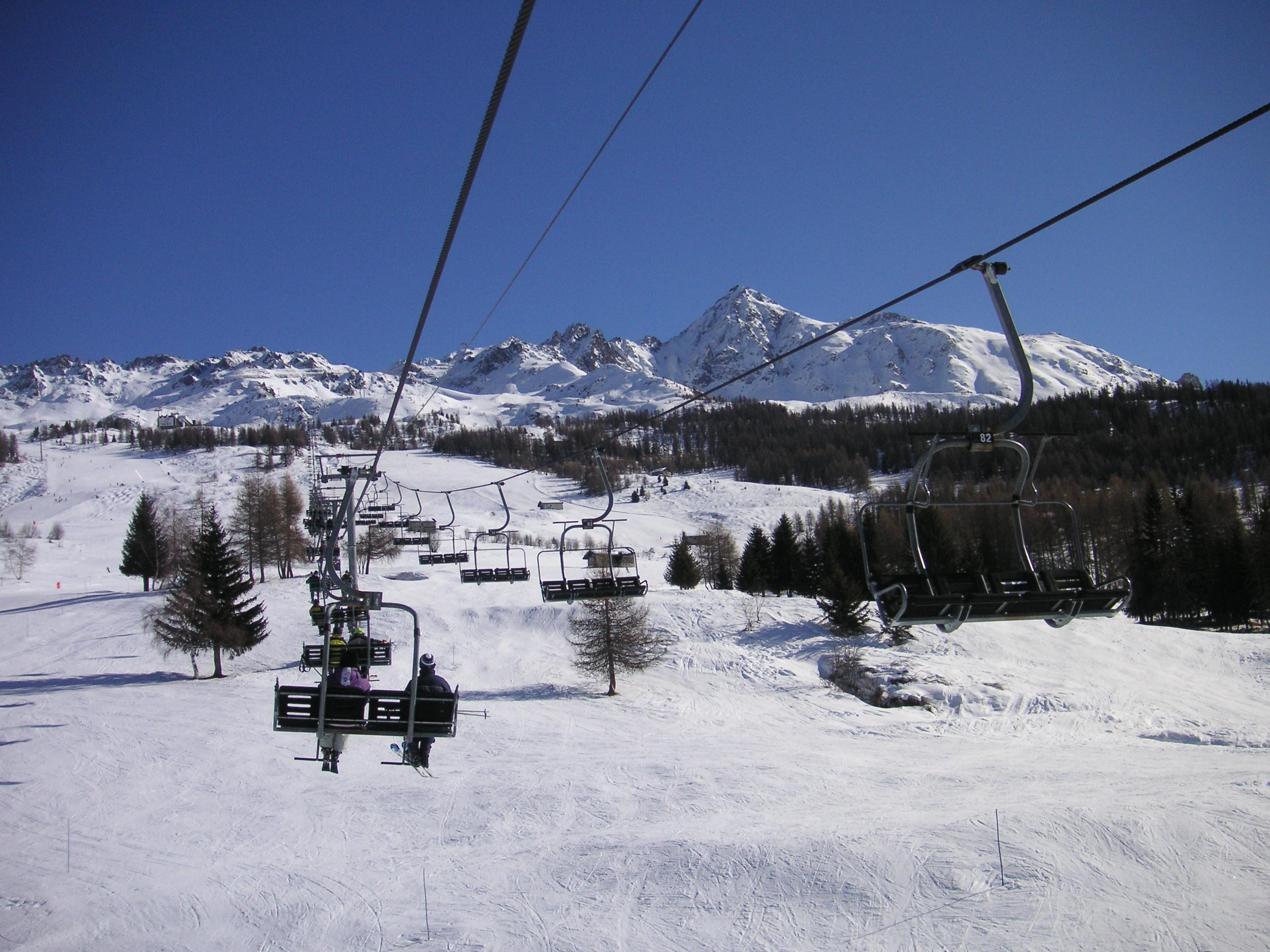 Les Arcs